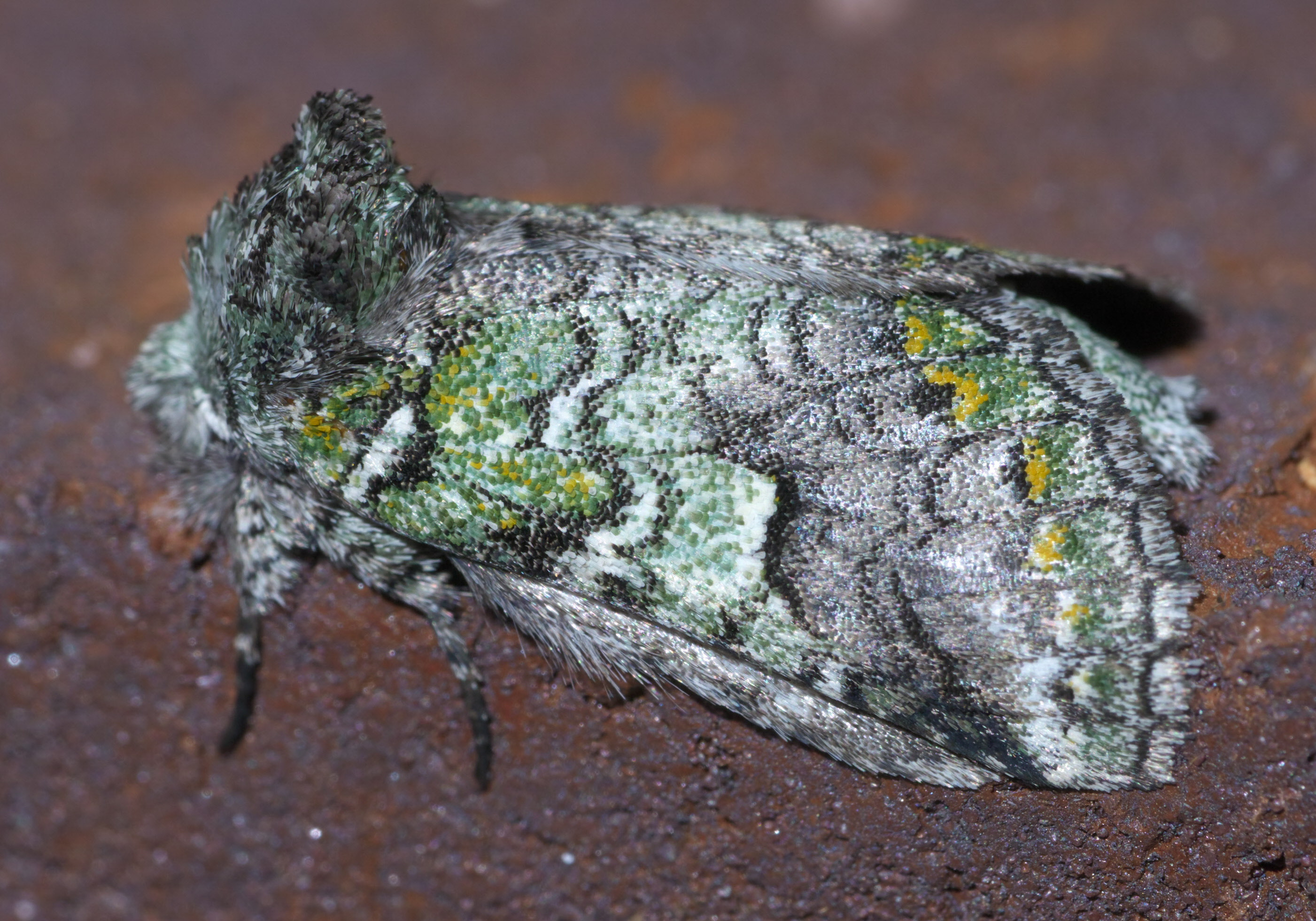 Litodonta hydromeli, Hodges #7968, ID Confidence: 90